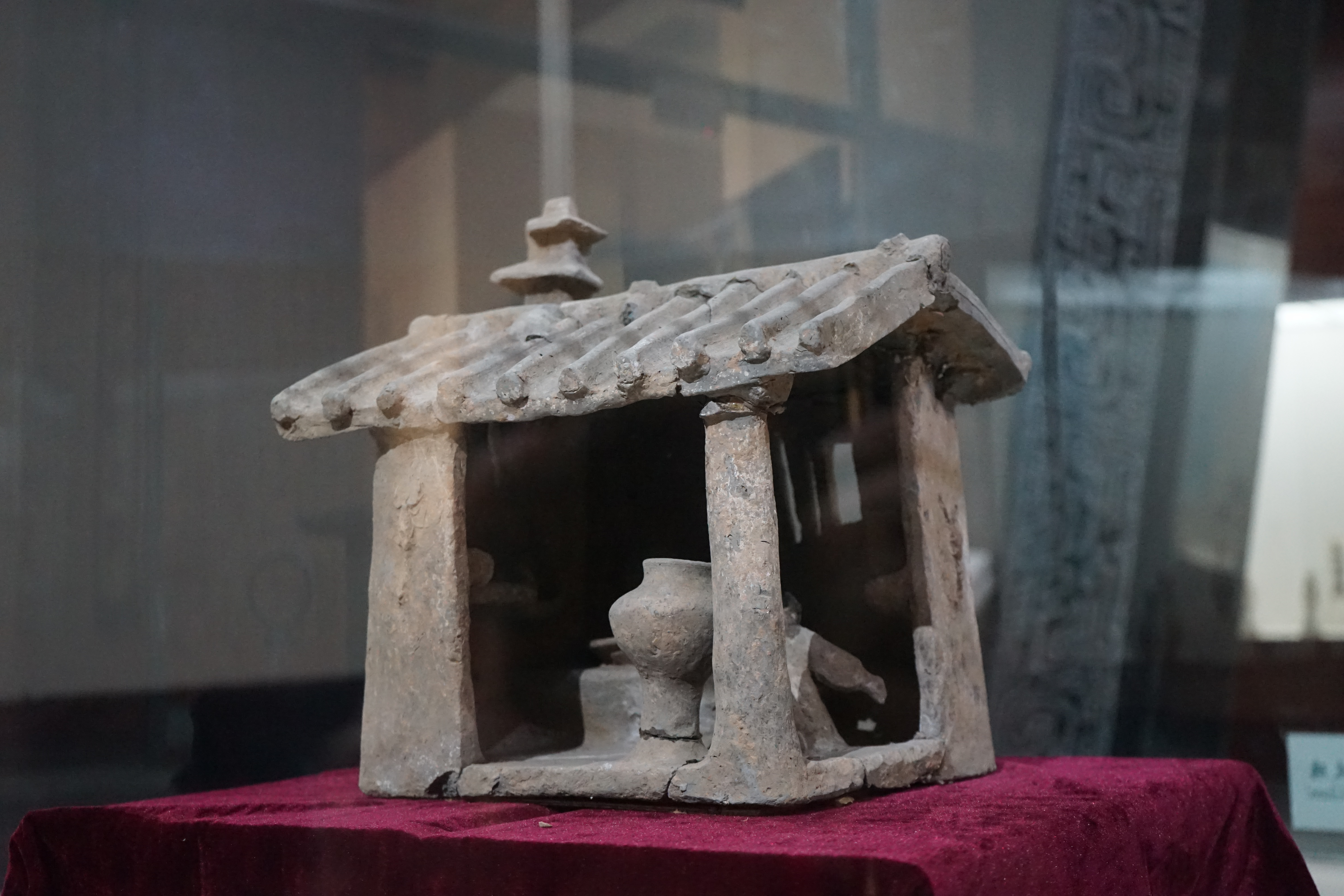 汉代陶厨房模型 单立间，瓦垄顶，一侧屋角上立烟囱。厨房内有一陶壶。门侧外壁上浮雕一蝎，一侧面开窗，不规则竖条式窗棂。房内一妇人跽座烧锅。屋顶、底部断开，后修复。国家一级文物